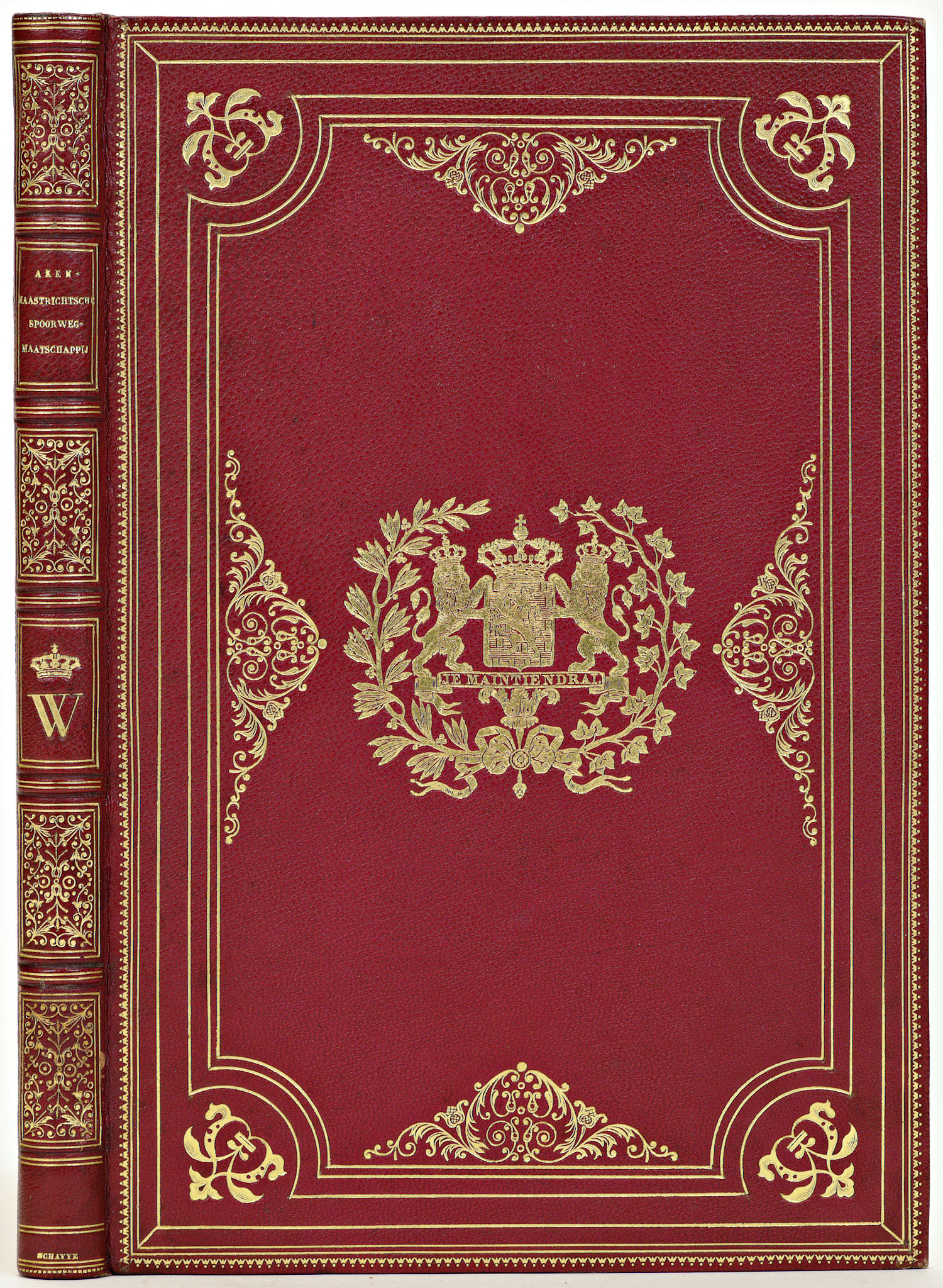 Inhoud: Statuten, acte van concessie ... [van de] Aken-Maastrichtse Spoorweg-Maarschappij. Maastricht, 1846.